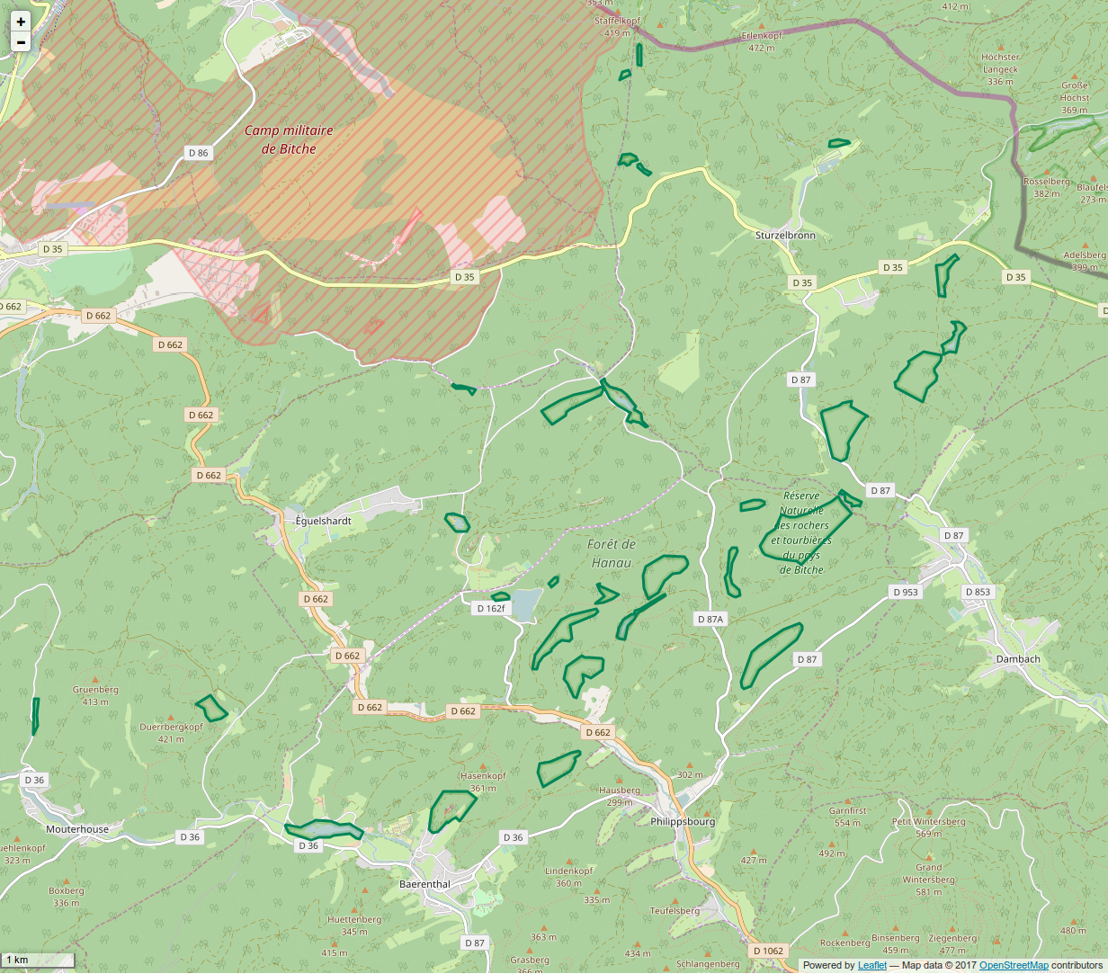 Périmètre de la RNN des Rochers et tourbières du pays de Bitche.